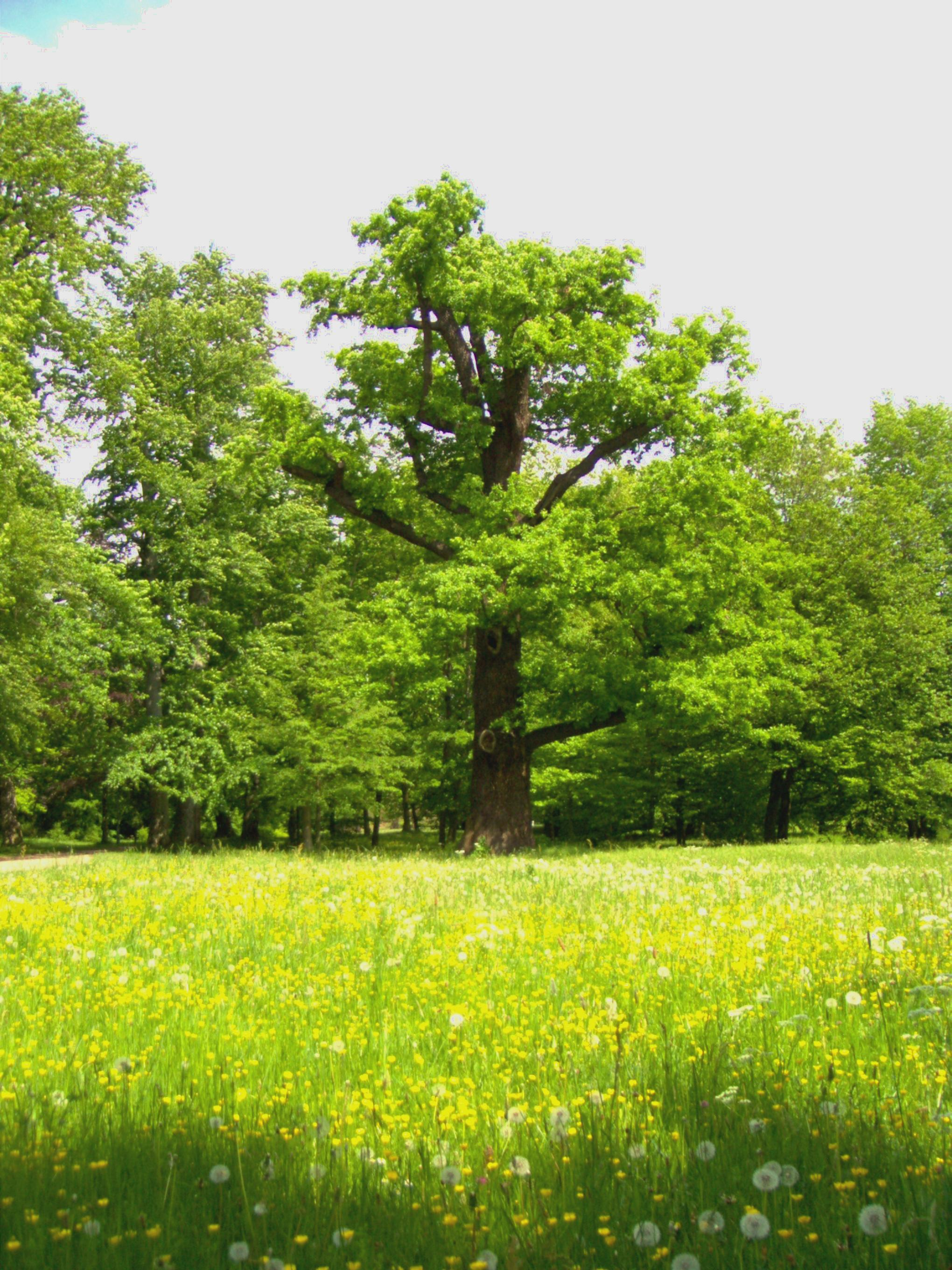 Alte Stieleiche im Gothaer Schlosspark, davor extensiv gemähter Parkrasen mit Scharfem Hahnenfuß.